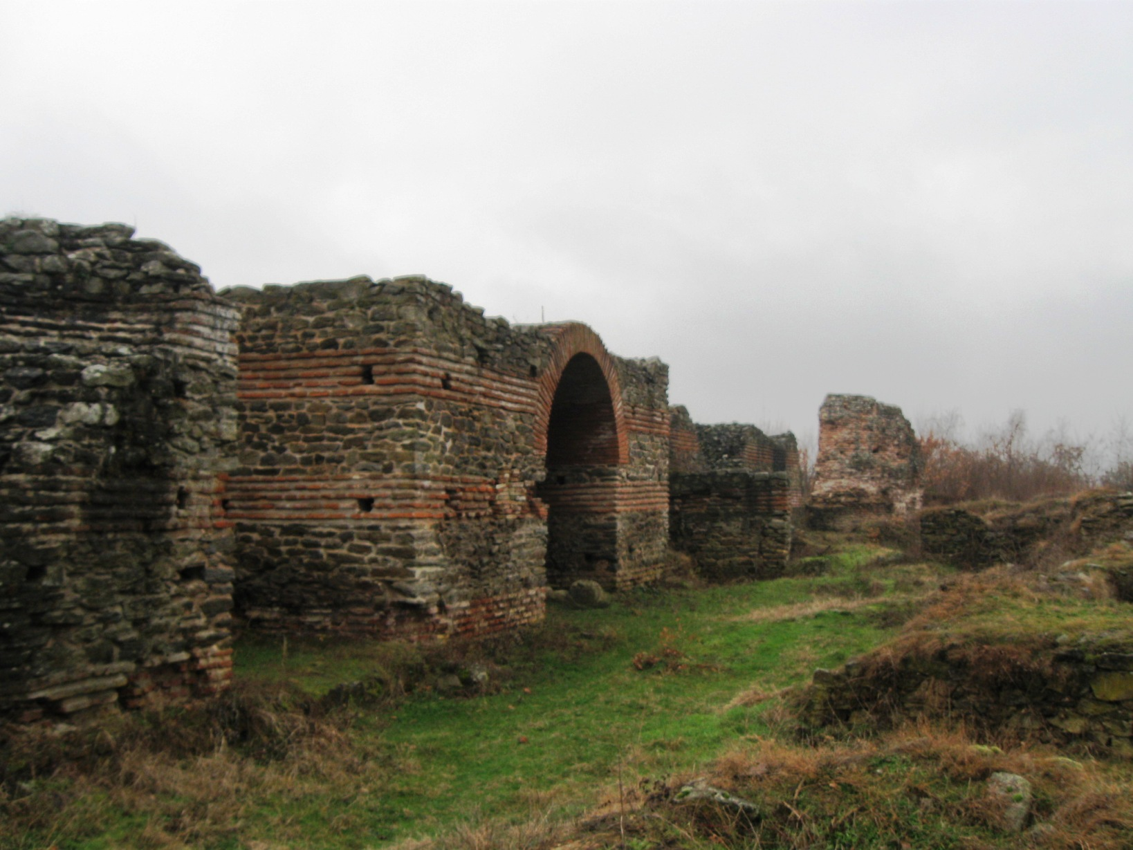 Caričin grad